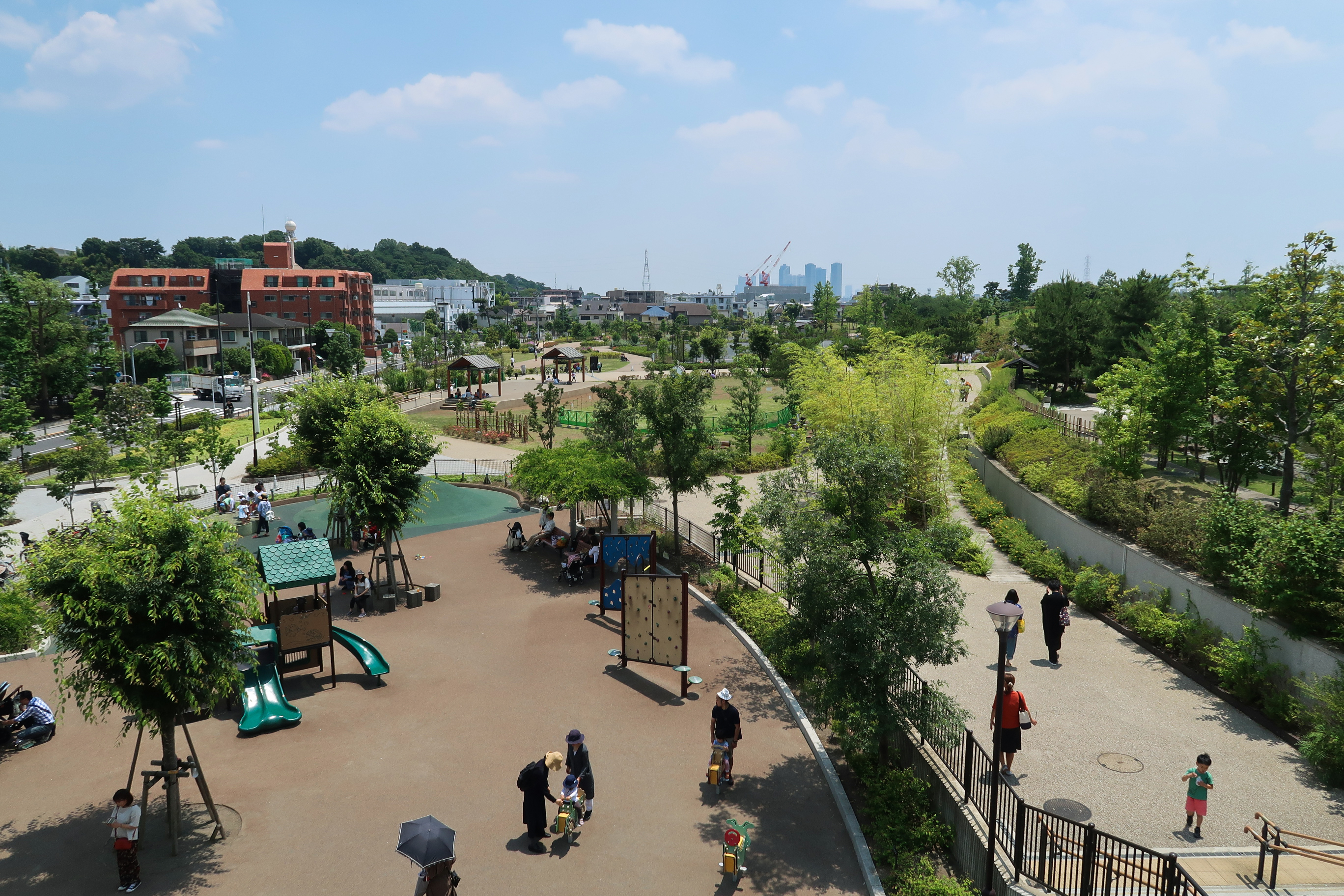 Futako-Tamagawa Park Overview